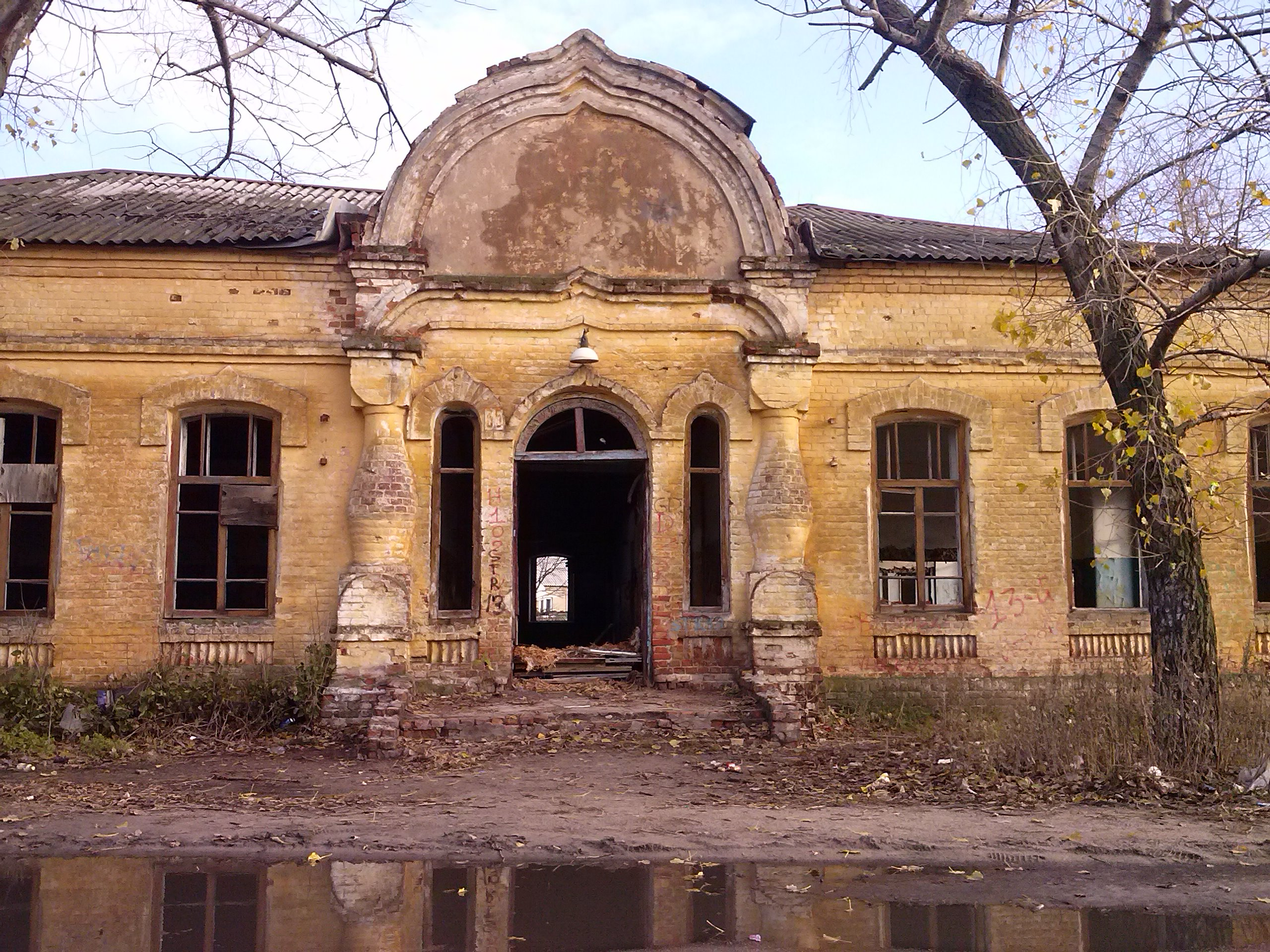 фото сделано 11 ноября 2012 года